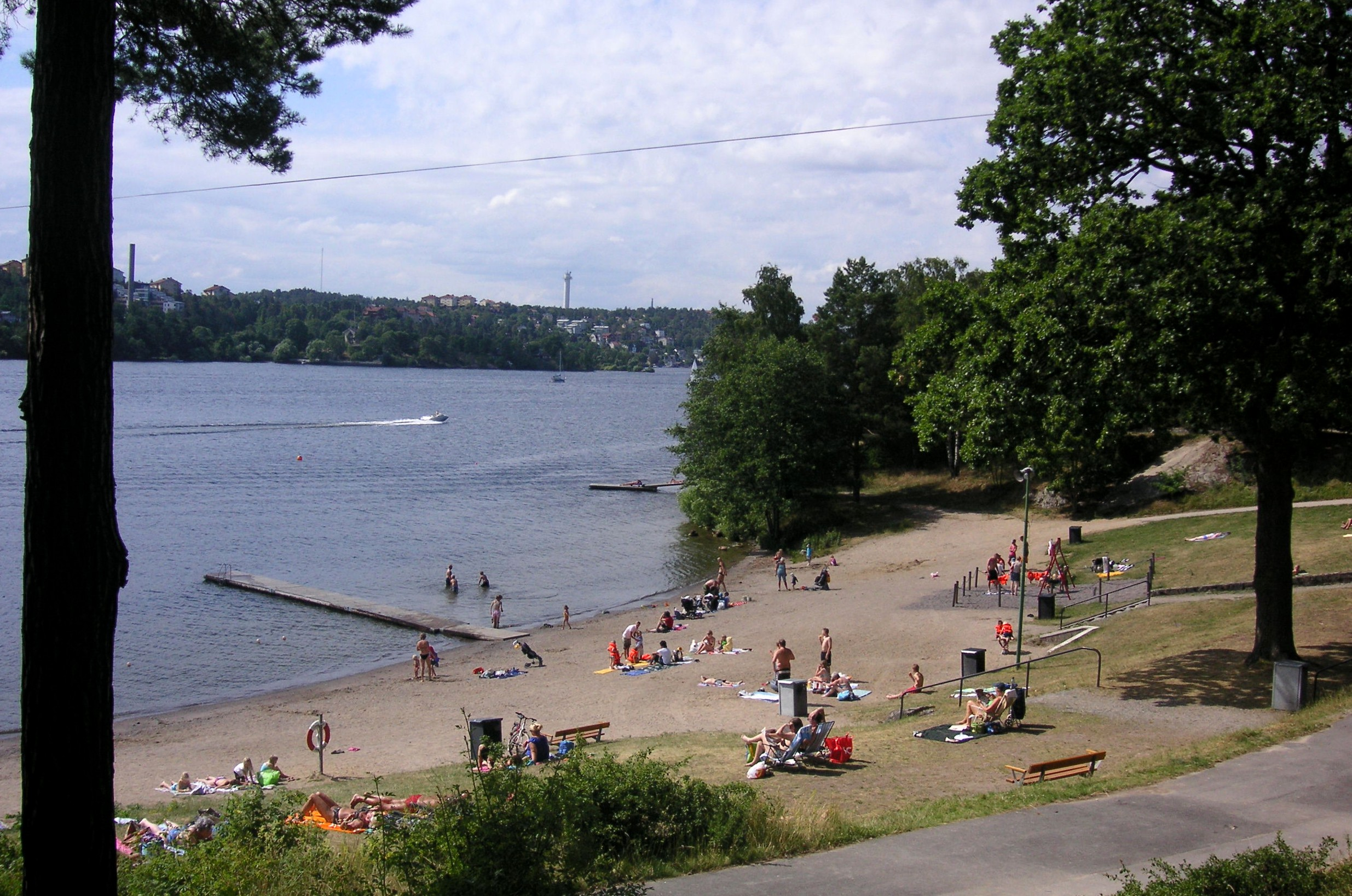 Solviksbadet i Bromma/Stockholm